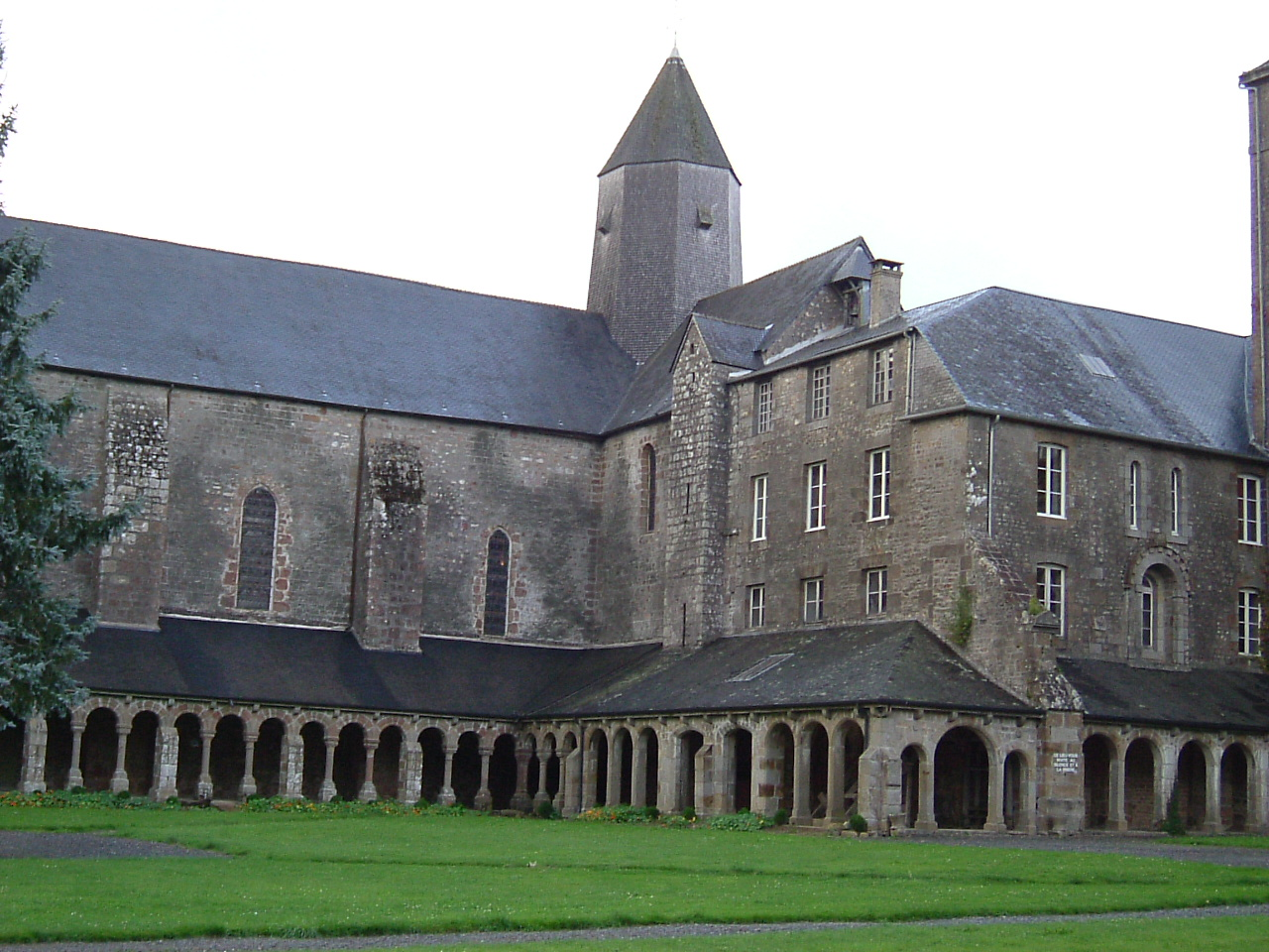 photographie de l'abbaye blanche de Mortain